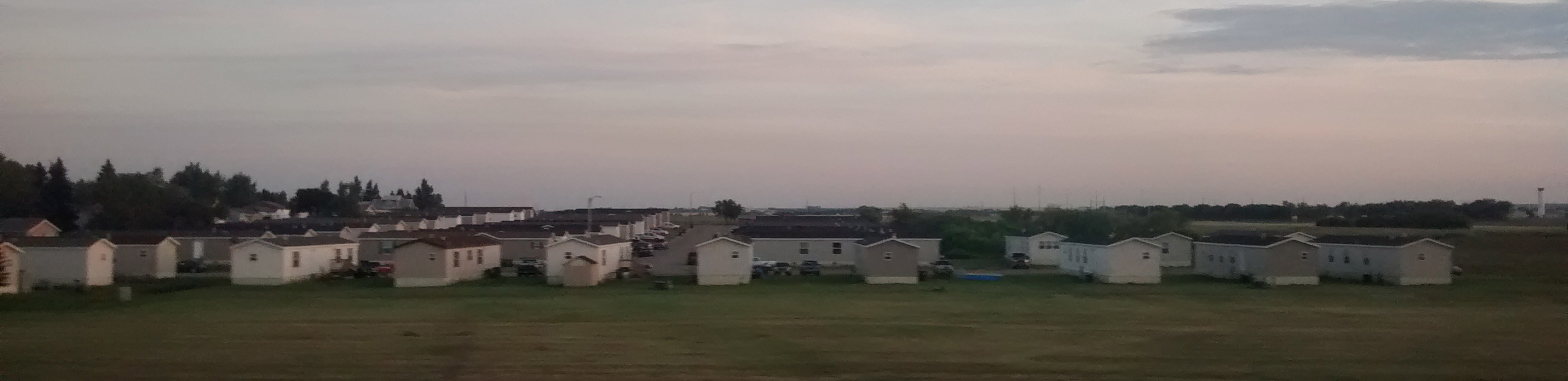 Tioga, North Dakota.